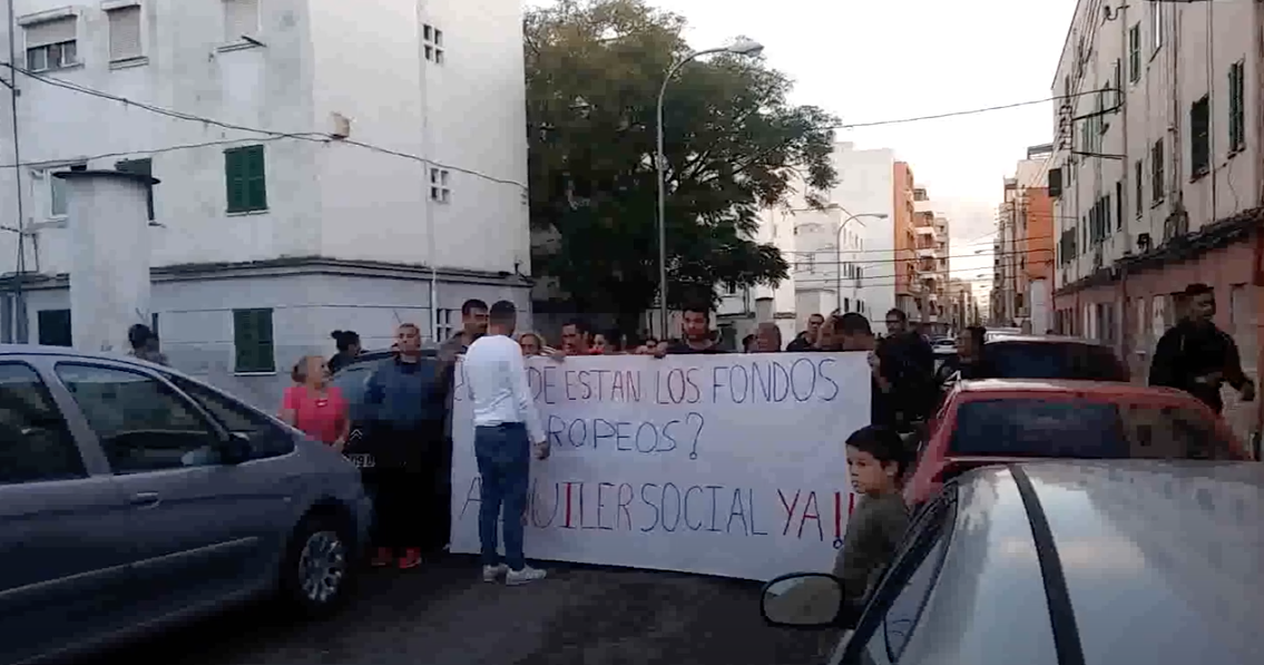 Manifestación en Corea contra el derribo del bloque 8 (08/10/2018)